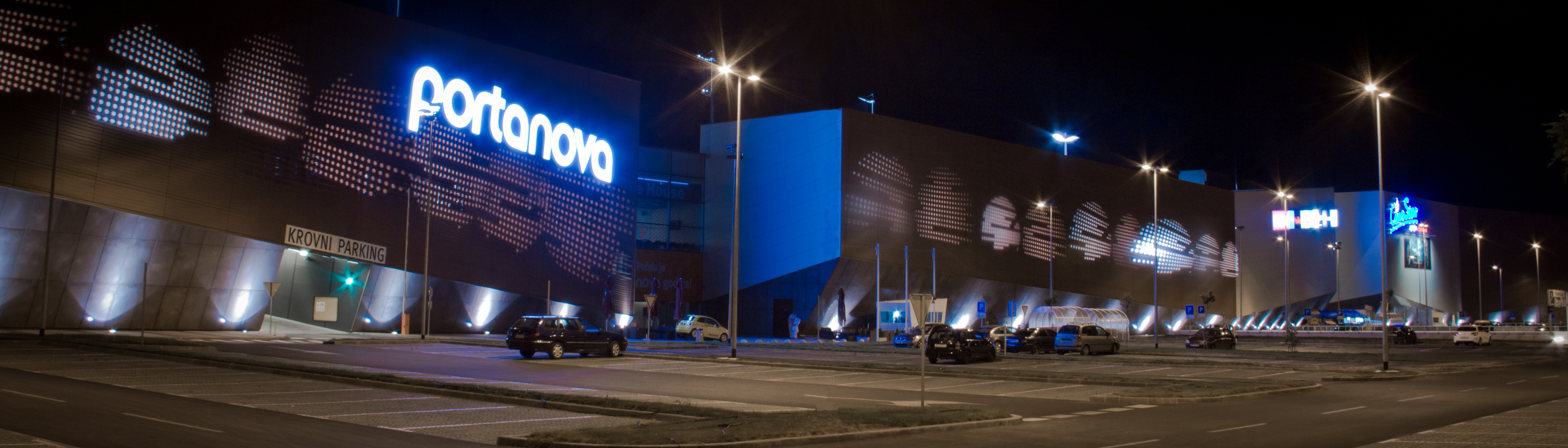 Portanova noću